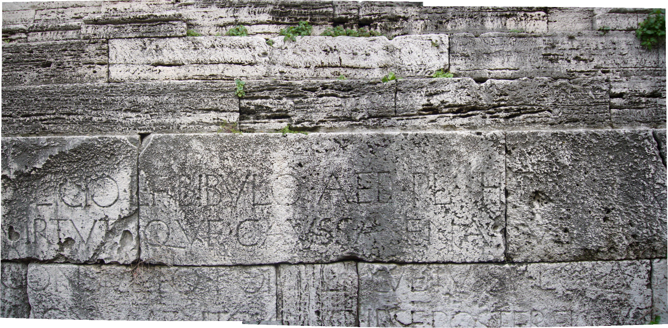 Roma, tomba di Caio Publicio Bibulo sotto il Vittoriano. Iscrizione. CIL VI 1319, VI 31599.